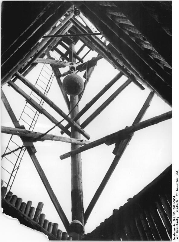 Schrott - ein wichtiger Faktor unseres Aufbaues. Die "Berliner Handelszentrale Schrott und Altstoffe" sorgt dafür, dass "Schrott und Altstoffe" als wertvolles Volkseigentum der Produktion wieder zugeführt werden. Auf Sammelplätzen für Bunt-Metalle und Schrott, die in verschiedenen Bezirken eingerichtet wurden, werden die Metalle sortiert, verbogene Träger gerichtet, um dann den Stahl- und Walzwerken als Rohstoff geliefert zu werden. UBz: Auf dem Schrottplatz in Pankow befindet sich ein Fallwerk, das mit einer 3 to. schweren Kugel, die in den Turm des Fallwerkes 10 m hochgezogen wird und von dort auf das Fusstück fällt, grosse Schrottteile aus Guß zum Gebrauch zerkleinert. Zentralbild Quasch. 3.1.1952